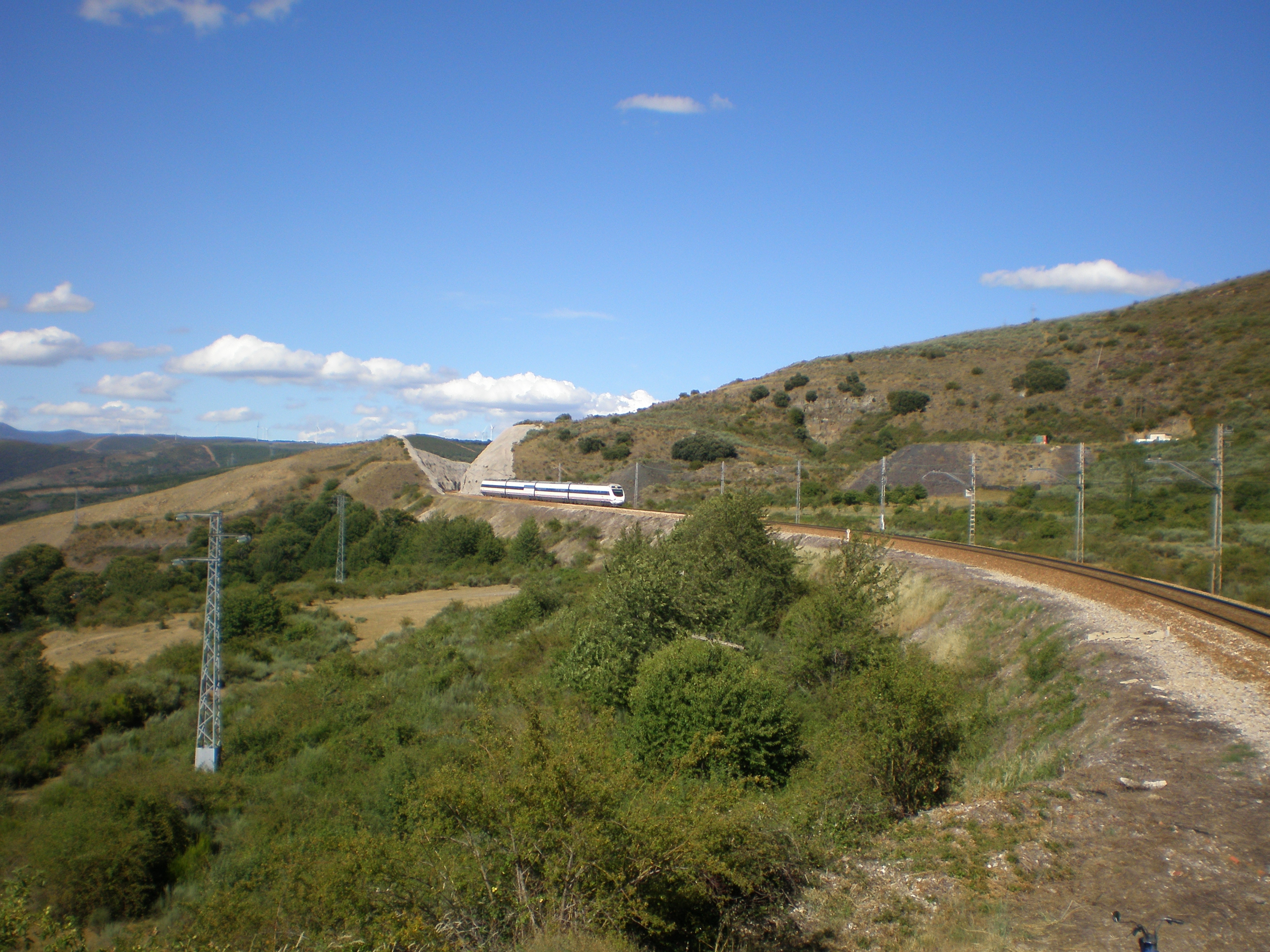 Un automotor eléctrico de la serie 120 de Renfe Operadora, que realiza un servicio Alvia Barcelona Sants - Vigo, por la Línea León-La Coruña, entre la estación de Brañuelas y la estación de La Granja, que está a punto de cruzar, en el término municipal de Torre del Bierzo.